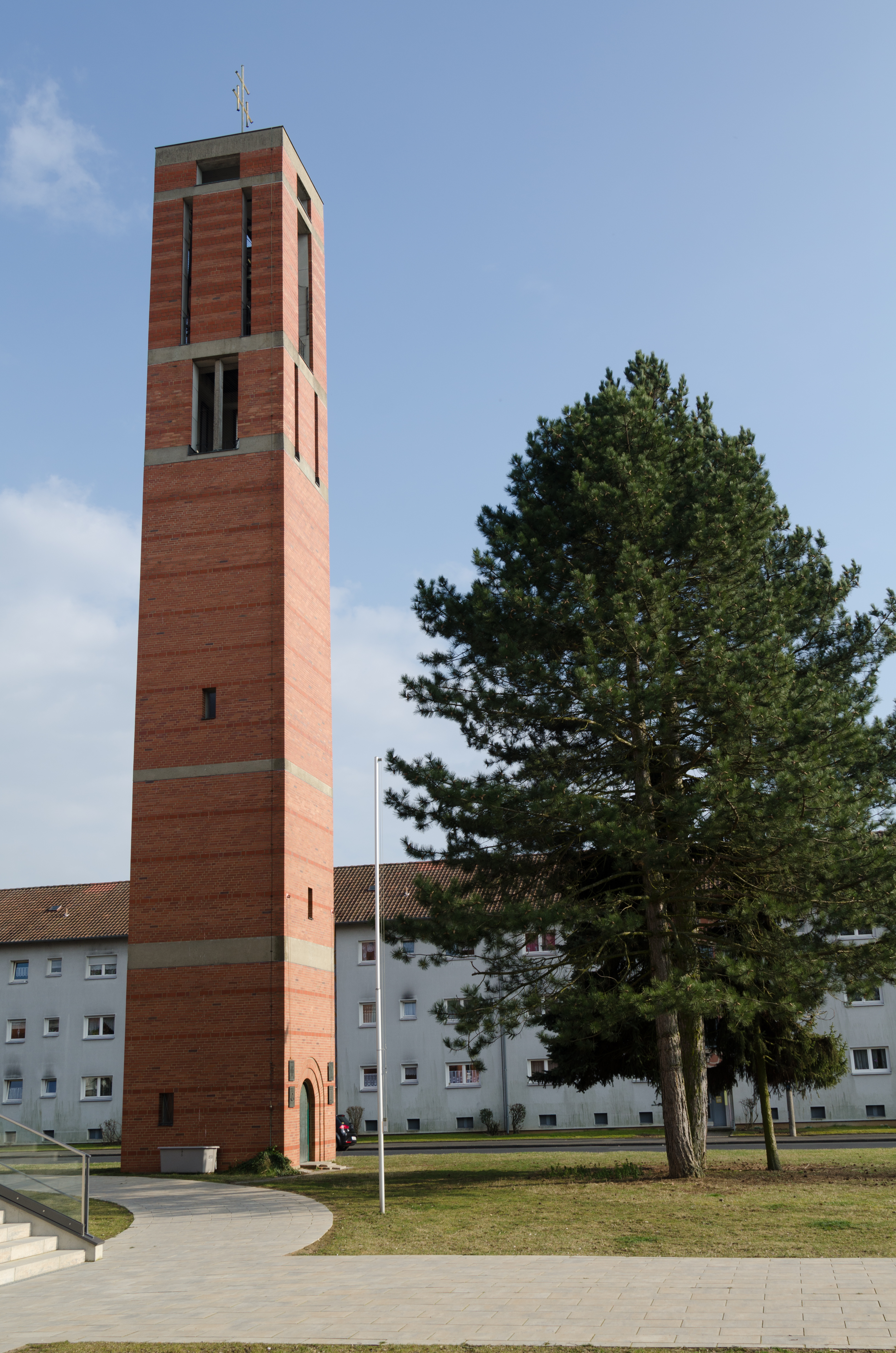 Schweinfurt, Brombergstraße 73